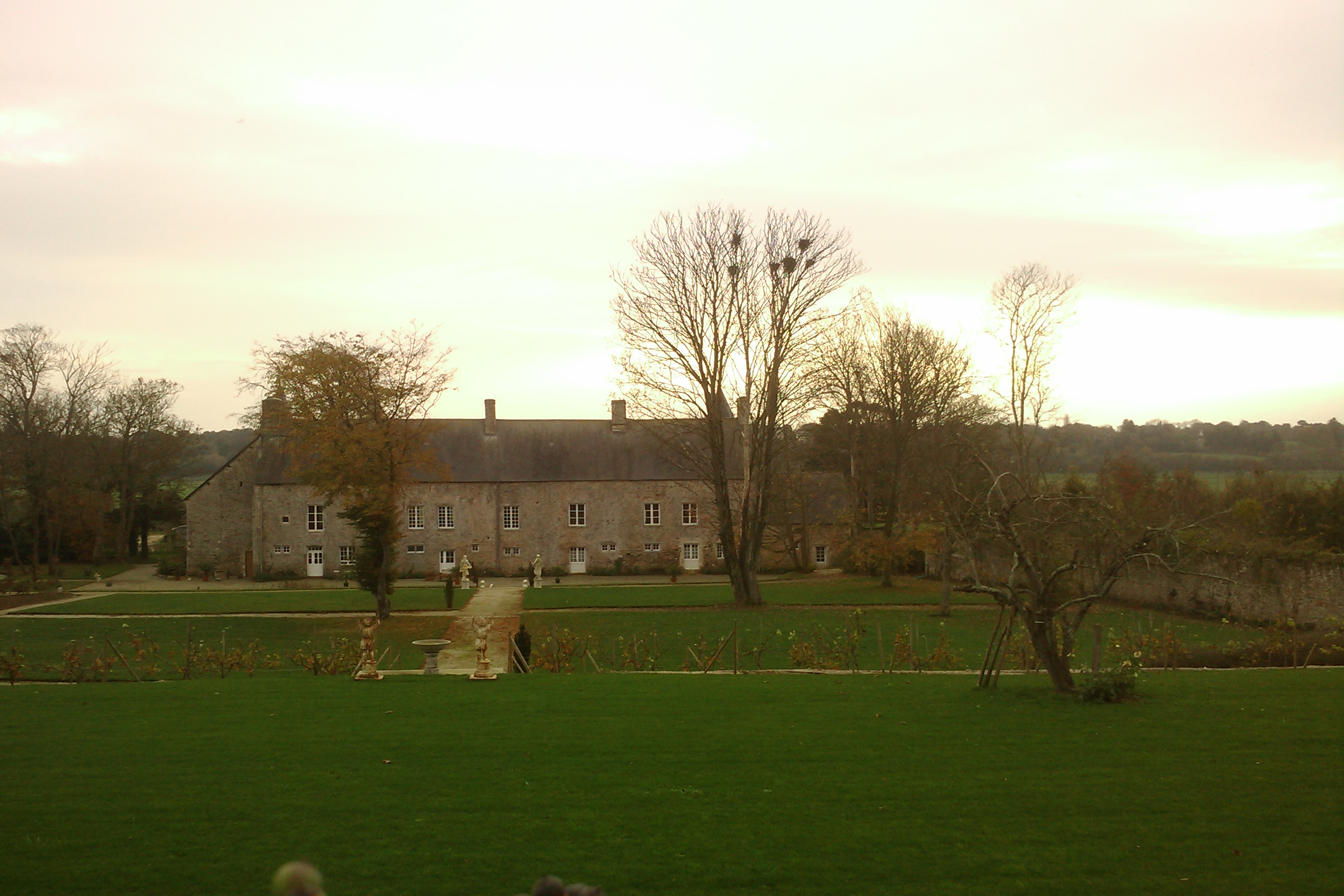 Château d'Étienville